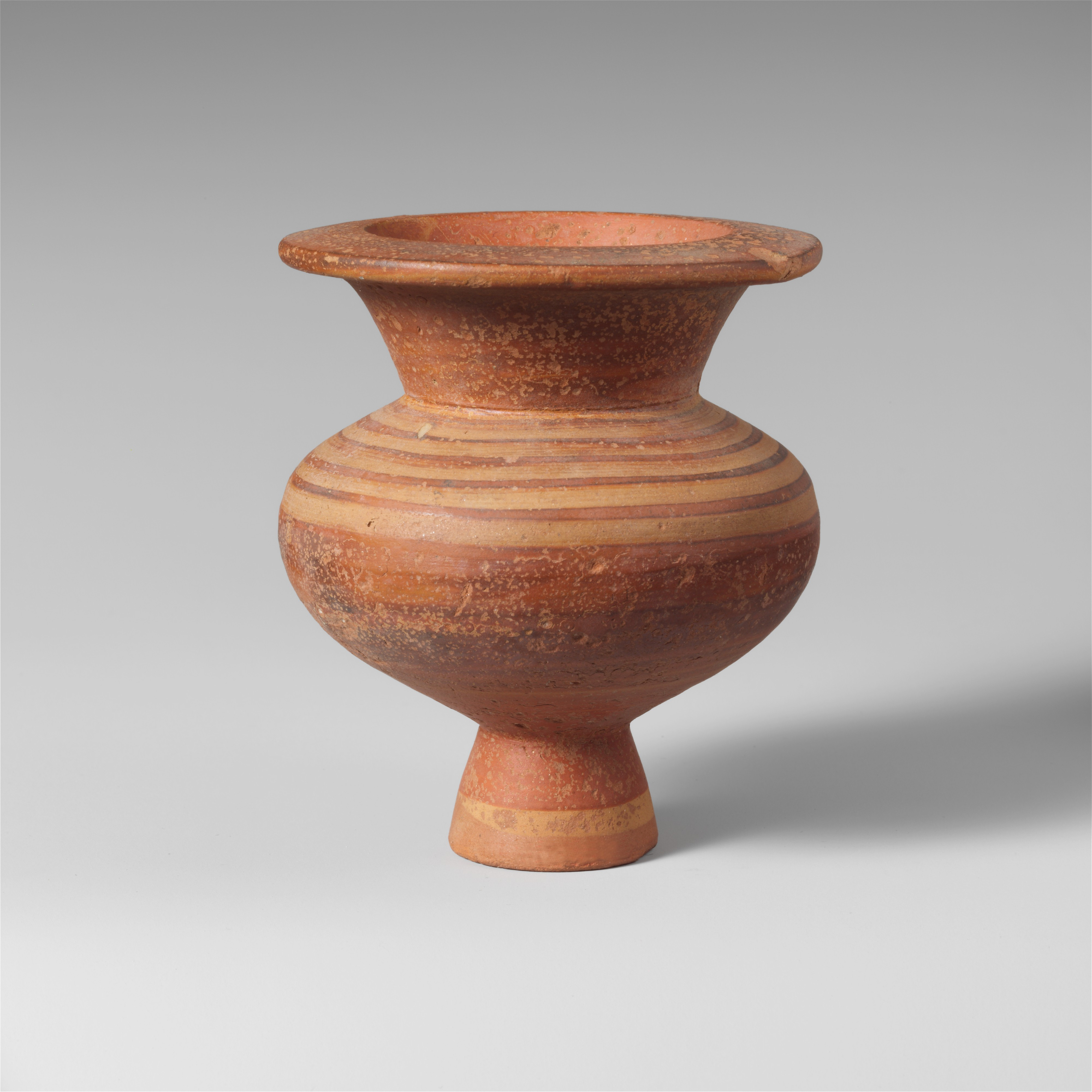 Lydian; Lydion; Vases